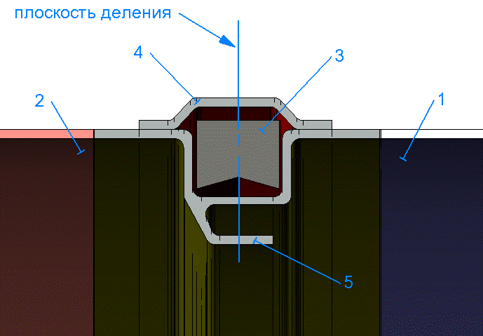 Anillo explosivo para la separación de fases de un cohete